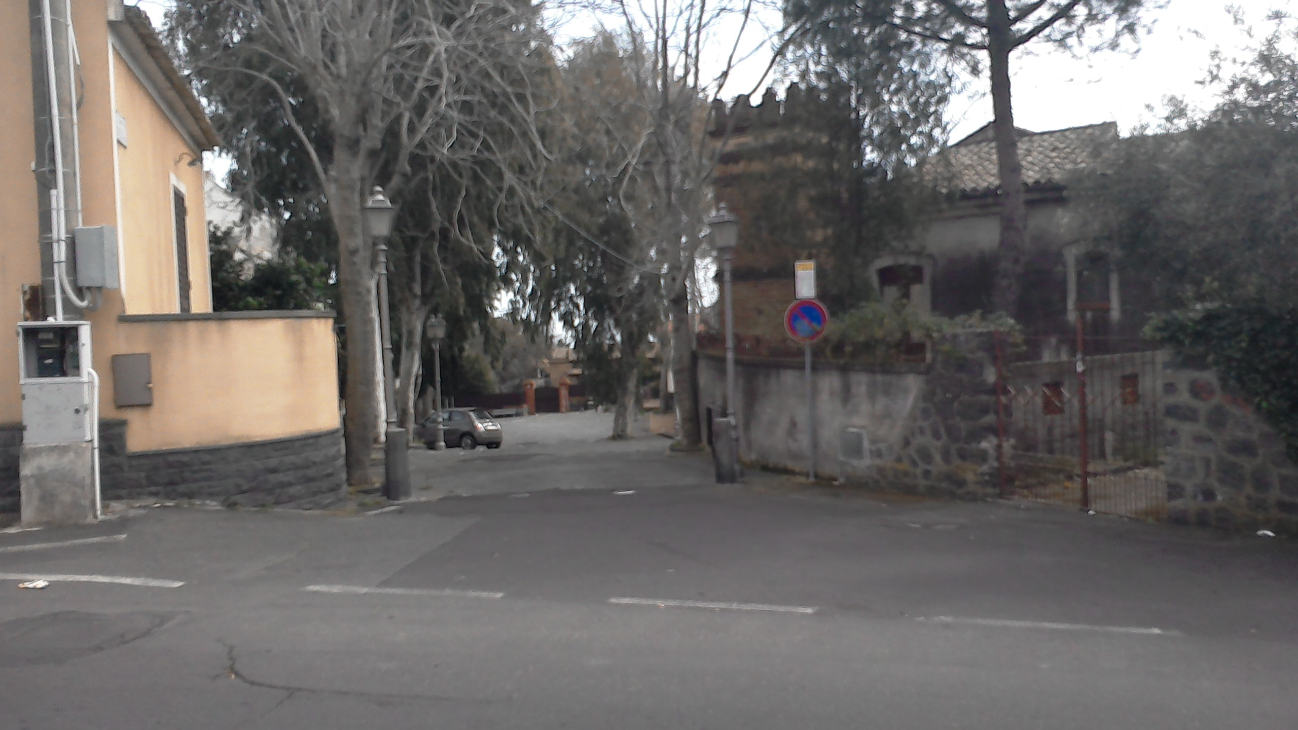 Ingresso del piazzale antistante la chiesa della Madonna degli Ammalati - Misterbianco.